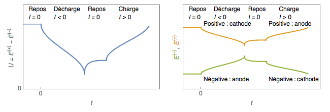 Définition de positive, négative, anode et cathode pour un accumulateurt